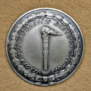 Odznaka SPP I Okregu Korpusu